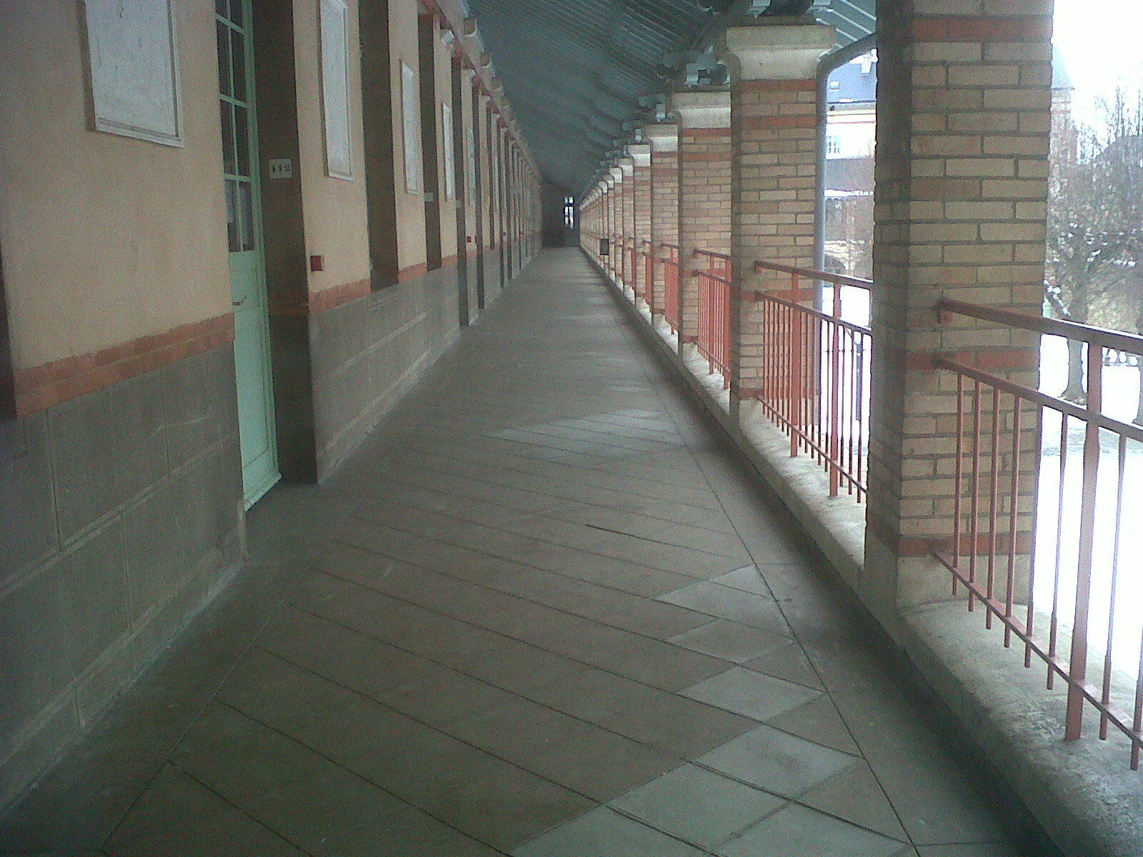 Couloir du premier étage, bâtiment de Cours.